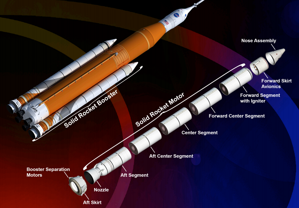 SLS' SRB Scheme